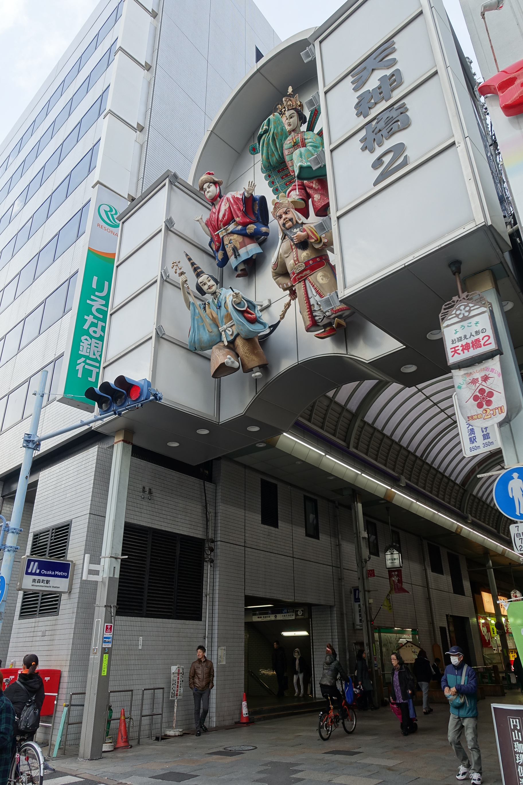 天神橋筋商店街の入口に隣接する、Osaka Metro南森町駅3号出入口（2018年12月）